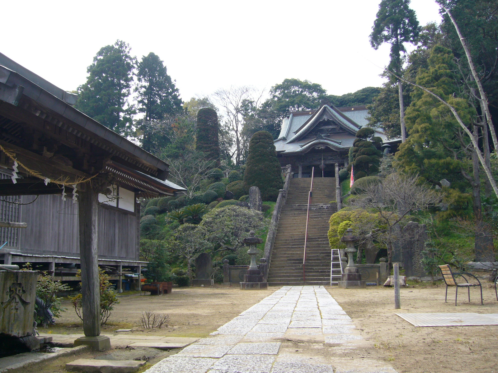 kanpukuji-temple,yamakura,katori-city,japan